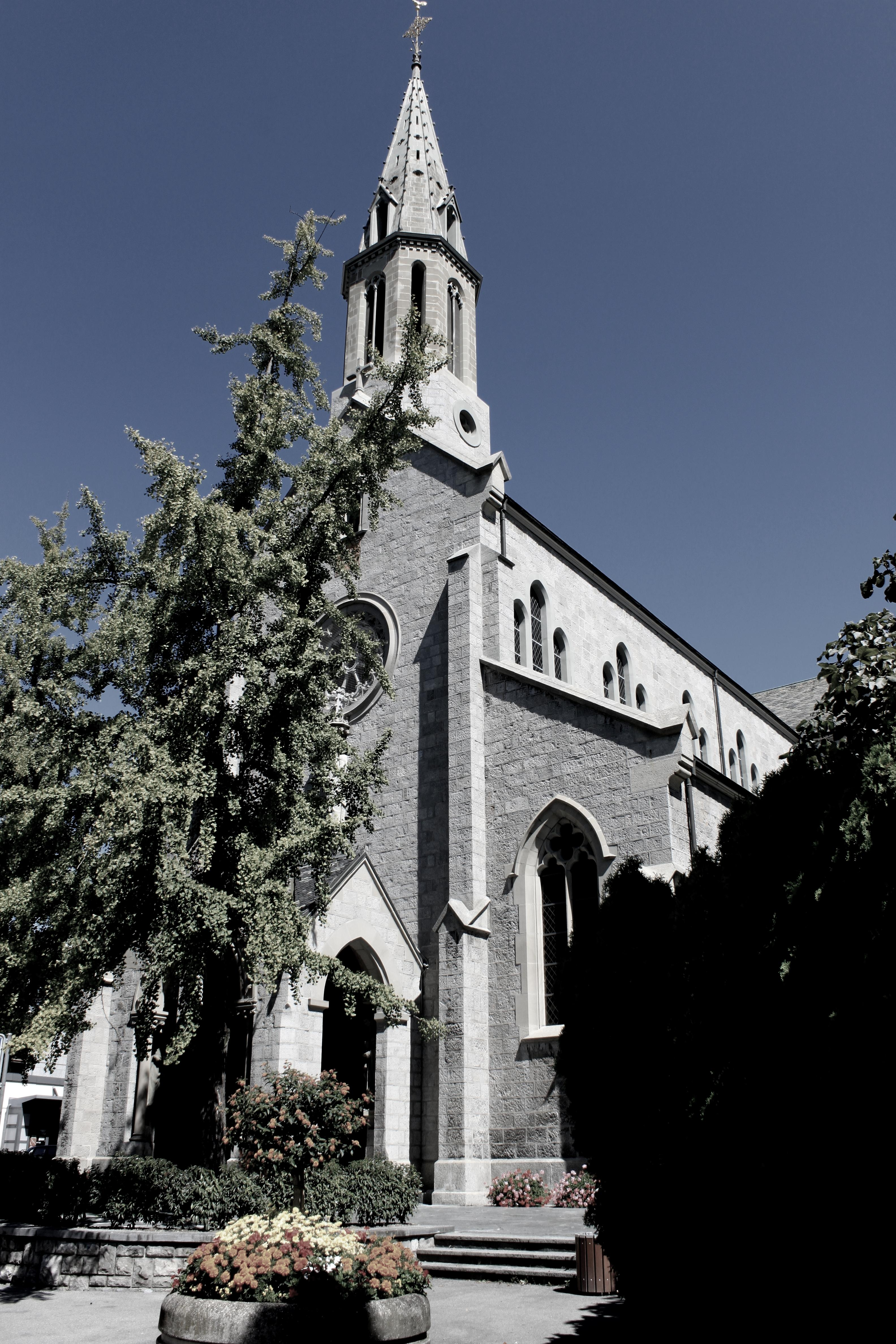 Suisse, canton de Vaud, Vevey, Eglise catholique Notre-Dame. Fondée en 1833, église de style néo-gothique.